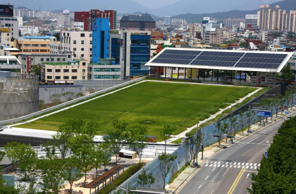 하늘마당전경